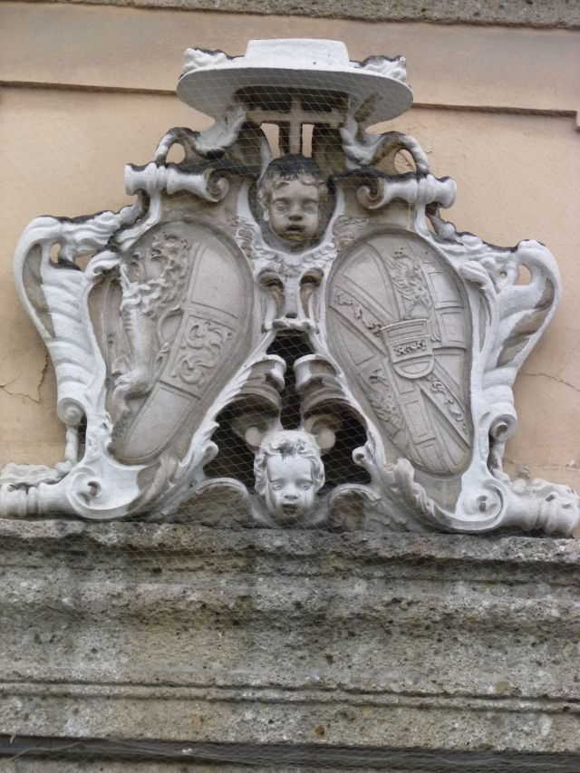 Allianzwappen St. Josefskirche